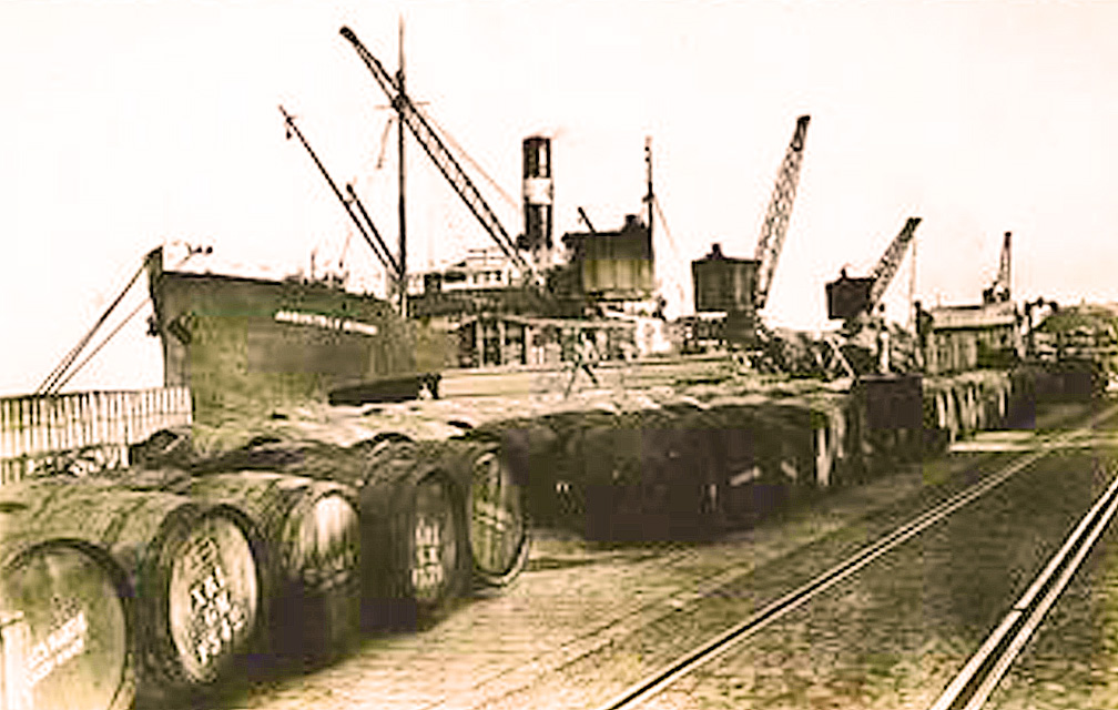 Chargement de vins de Camargue sur les quais de Port-Saint-Louis-du-Rhône